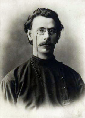 Скиталец